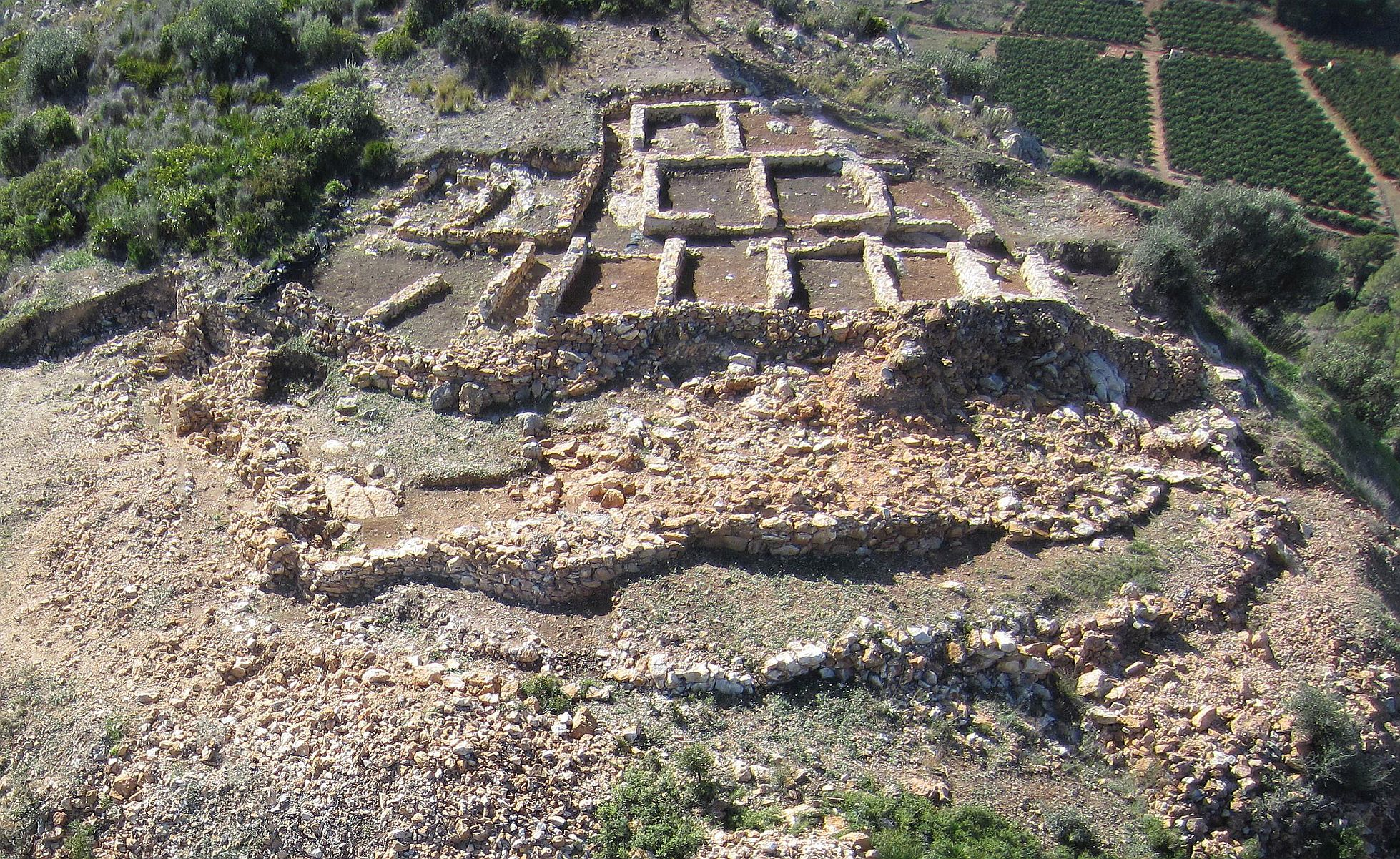 Vista desde el norte del Mortórum